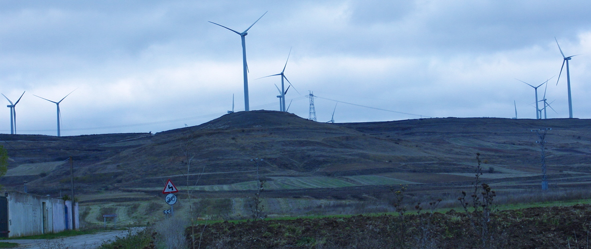 Vista parcial del Parque Eólico ""El Páramo"", Alfoz de Quintanadueñas, Burgos, España.